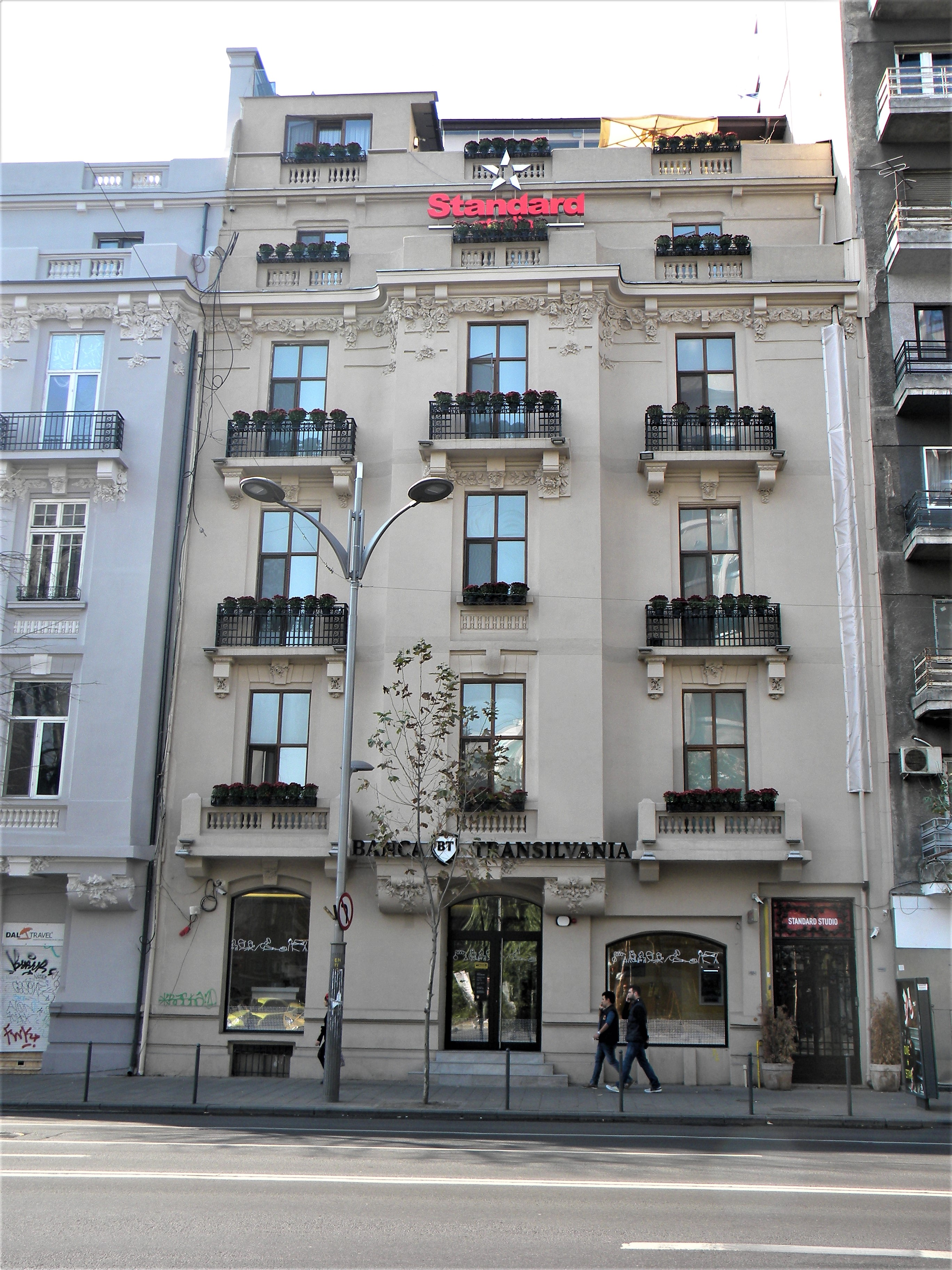 Bucuresti, Romania. Bulevardul Magheru 2017. Am inceput si noi sa poavazam frumos fatadele cladirilor.